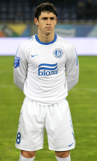 Перед матчем с ФК "Черноморец"